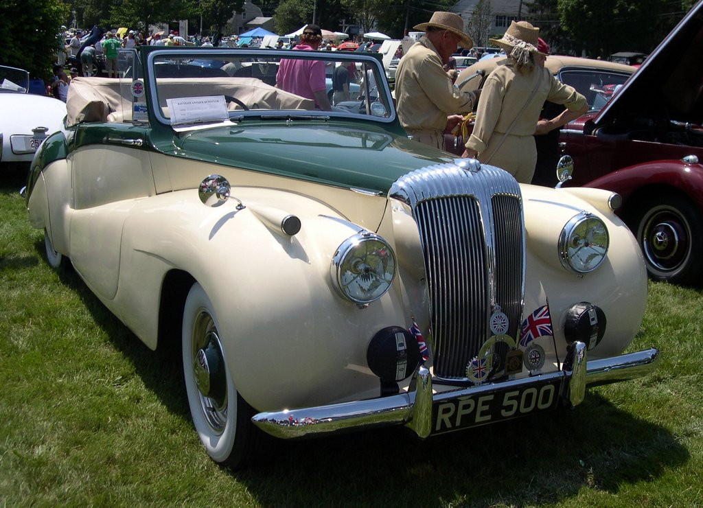 1952 Daimler DB18